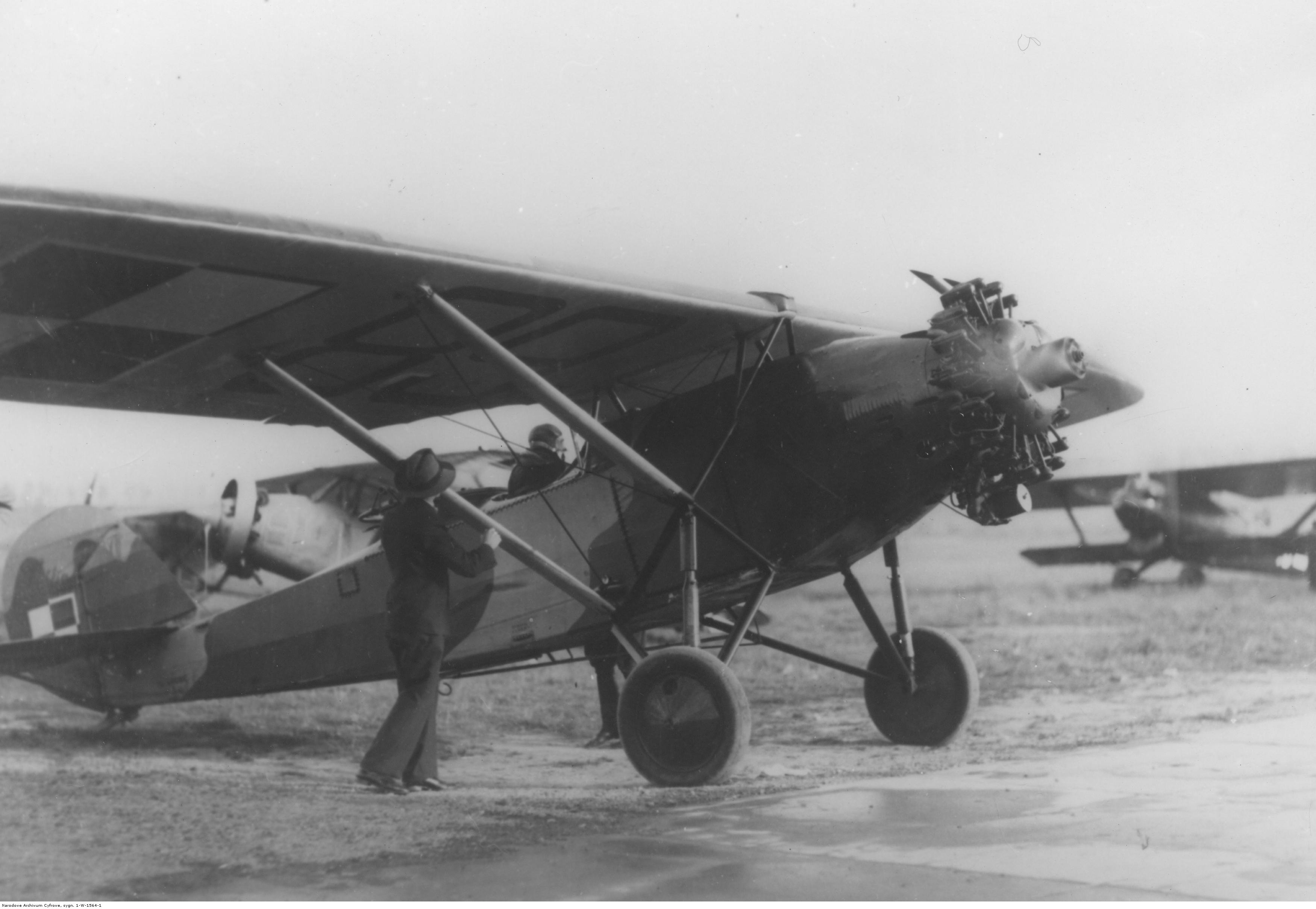 Samolot Lublin R-XIIIB na lotnisku.